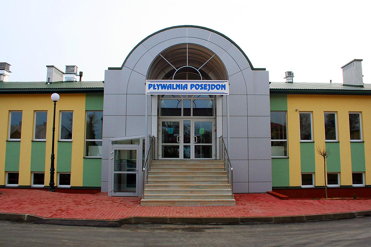 Pływalnia "Posejdon" przy SP nr 1 im. prof. Władysława Szafera w Brzozowie